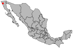 Locator map of Ensenada, Baja California, Mexico